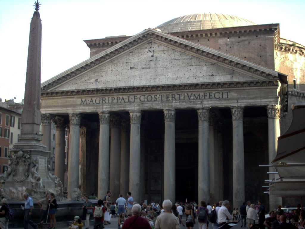 Facade du panthéon à Rome